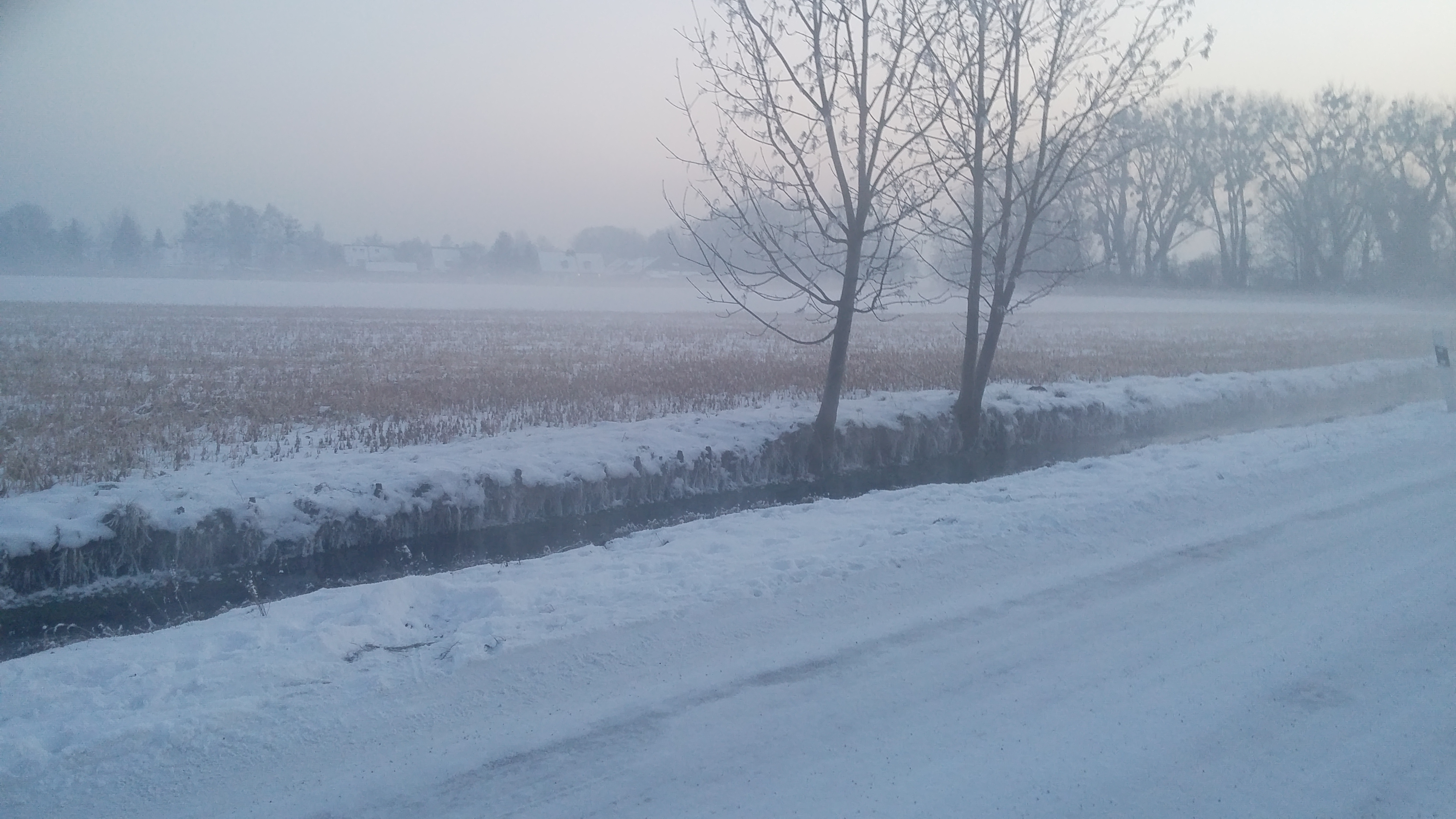 Feldmochinger Mühlbach im Winter